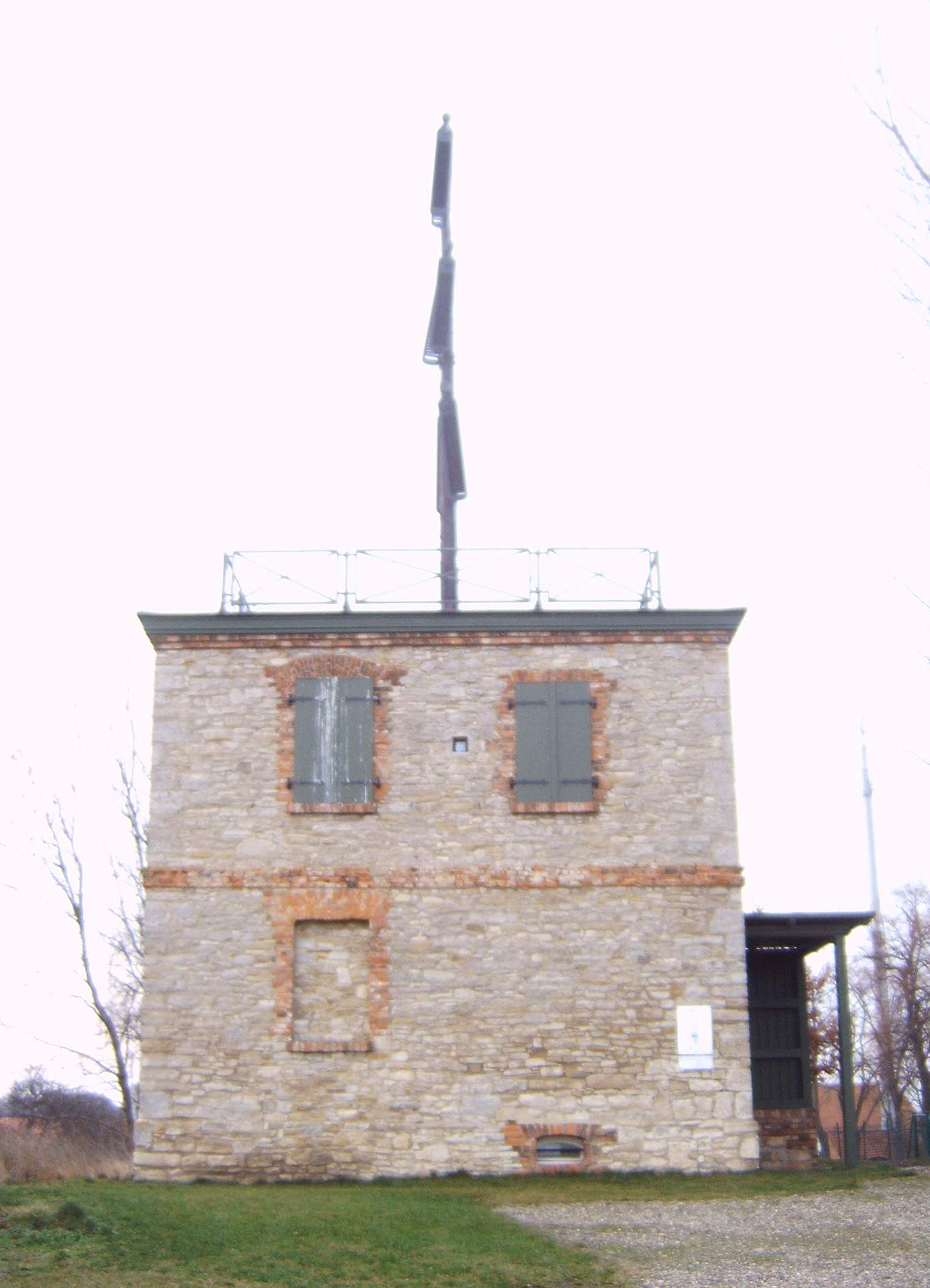 optischer Telegrafenturm bei Neuwegersleben (Sachsen-Anhalt)